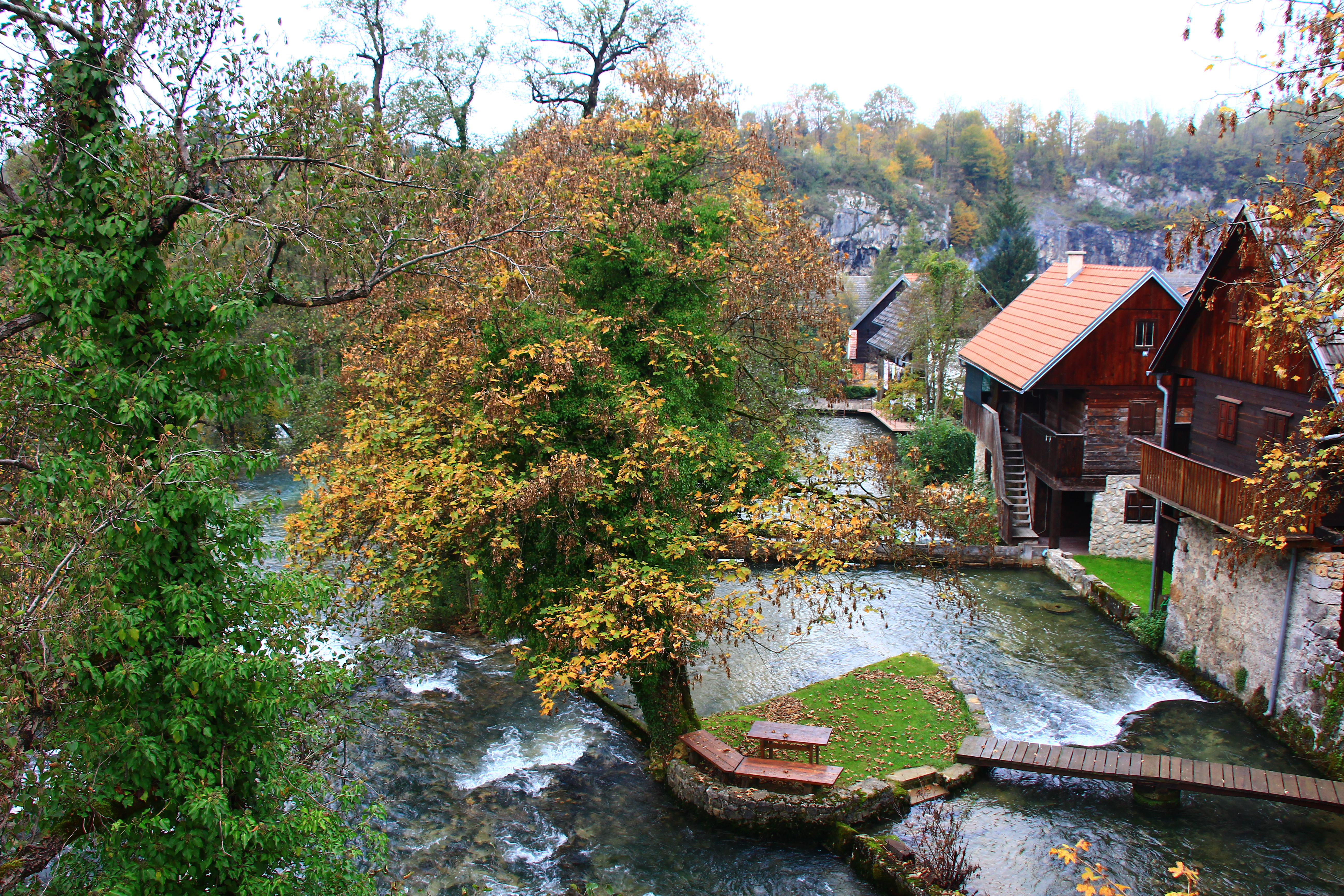 Rastoke mit seinen Wasserfälllen, Teil der Stadt Slunj in Kroatien